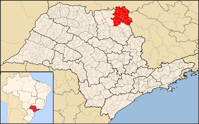 Mappa della dicoesi cattolica di Franca, nello stato di San Paolo, Brasile. Fonte per i confini della diocesi